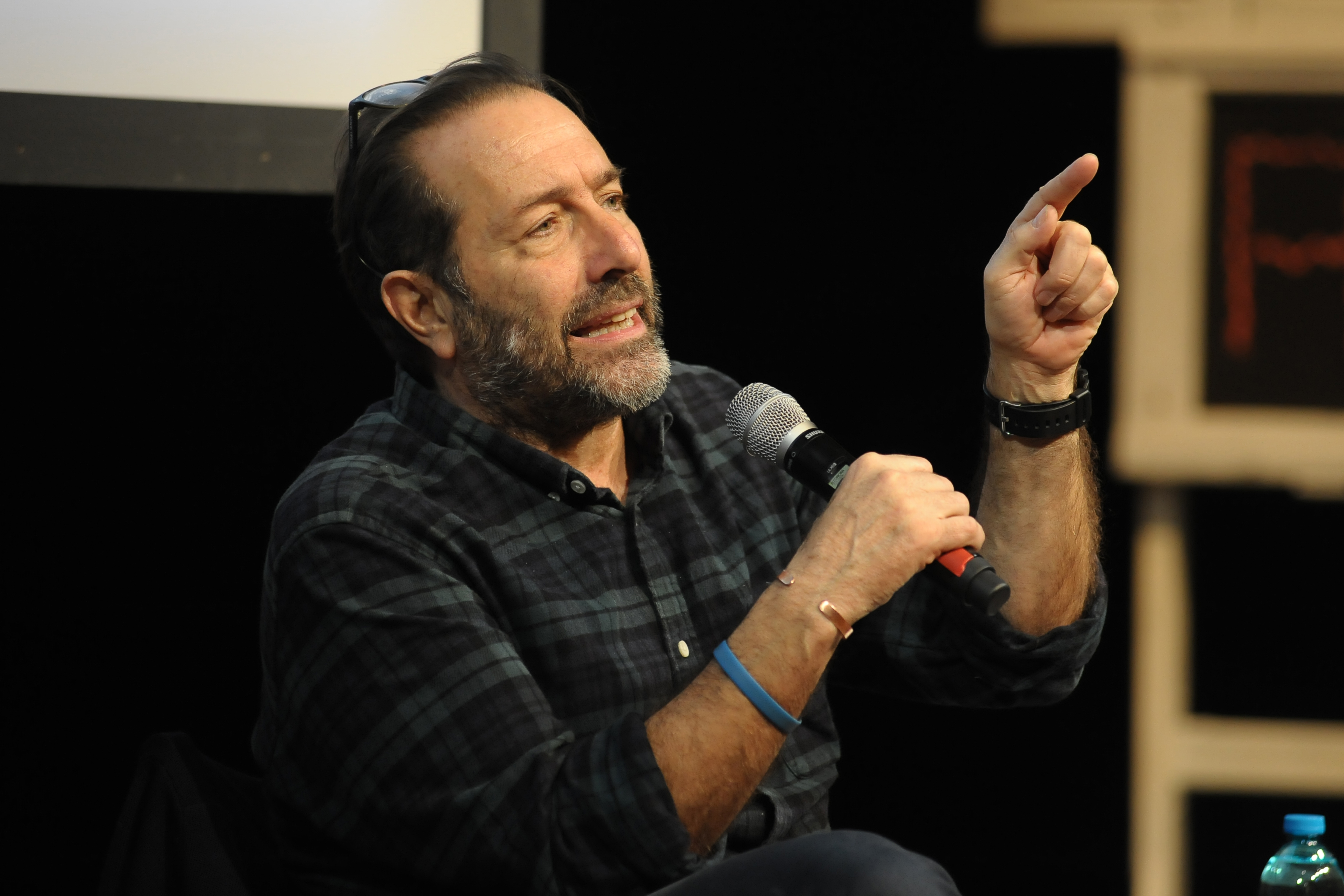 Intervento durante un convegno